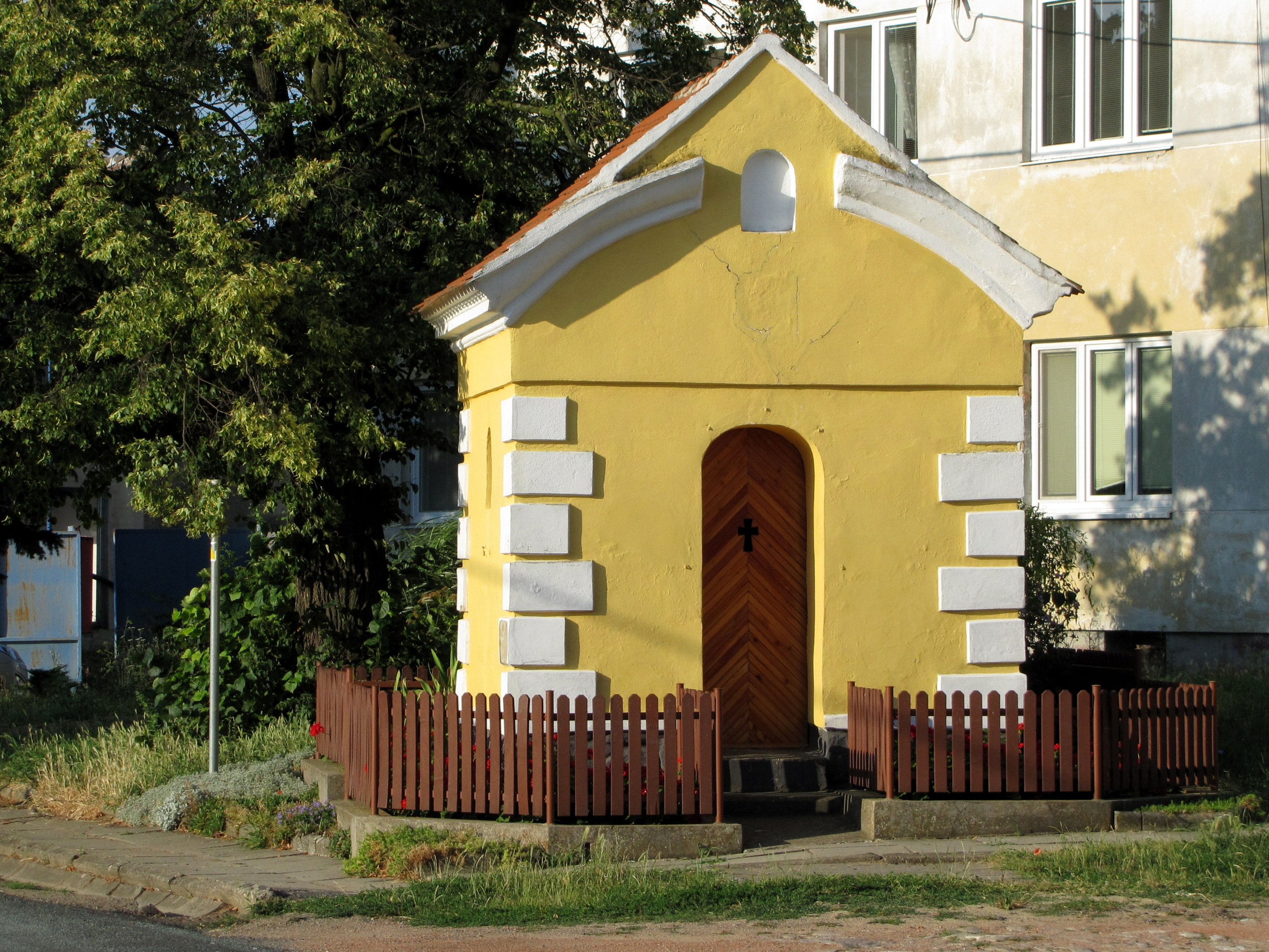 Kaple v Čeložnicích